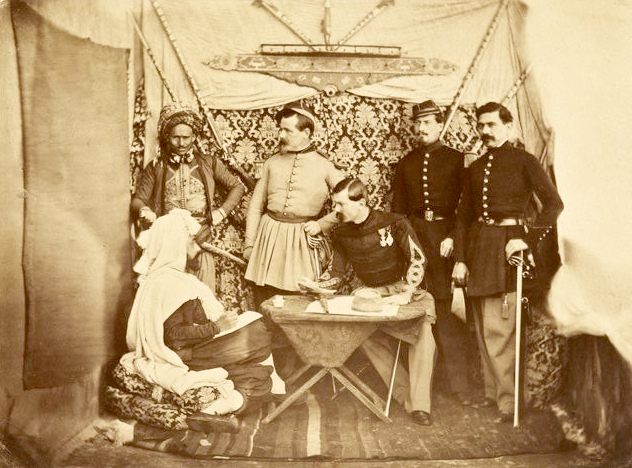 Bureau arabe de Bône (Algérie), 1856-1857. Bône s'appelle aujourd'hui Annaba.